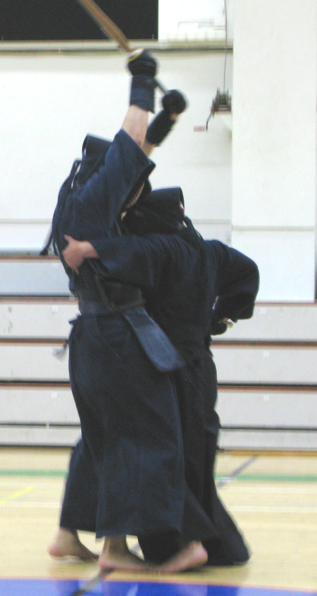 TAnkendon pisto rintaan ja käden hallinta takaa kuvattu